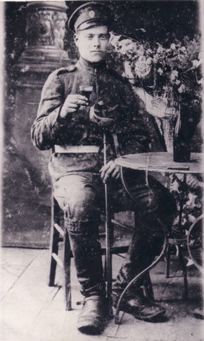 Първоизточник на снимката са личните албуми на потомците нса Демир Киряков, които предоставят снимката свободно за прикрепяне към биографията му.